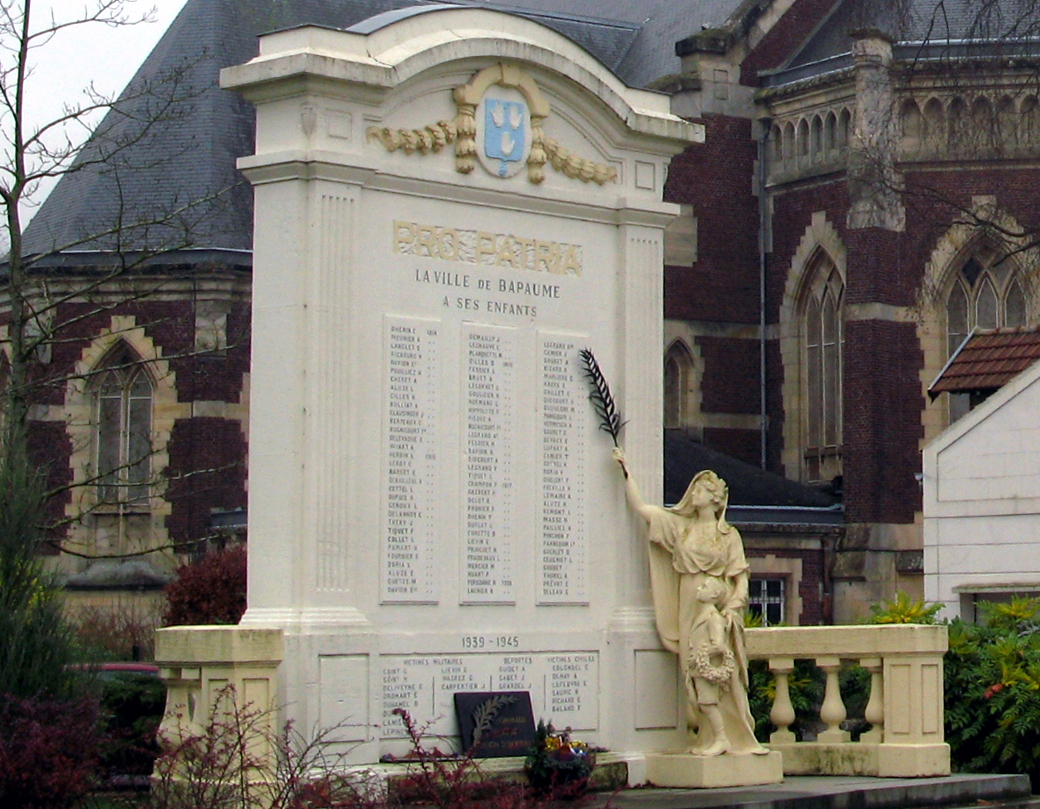 Bapaume (Pas-de-Calais, France) - Le monument-aux-morts et (en arrière-plan) l'église Saint-Nicolas. .